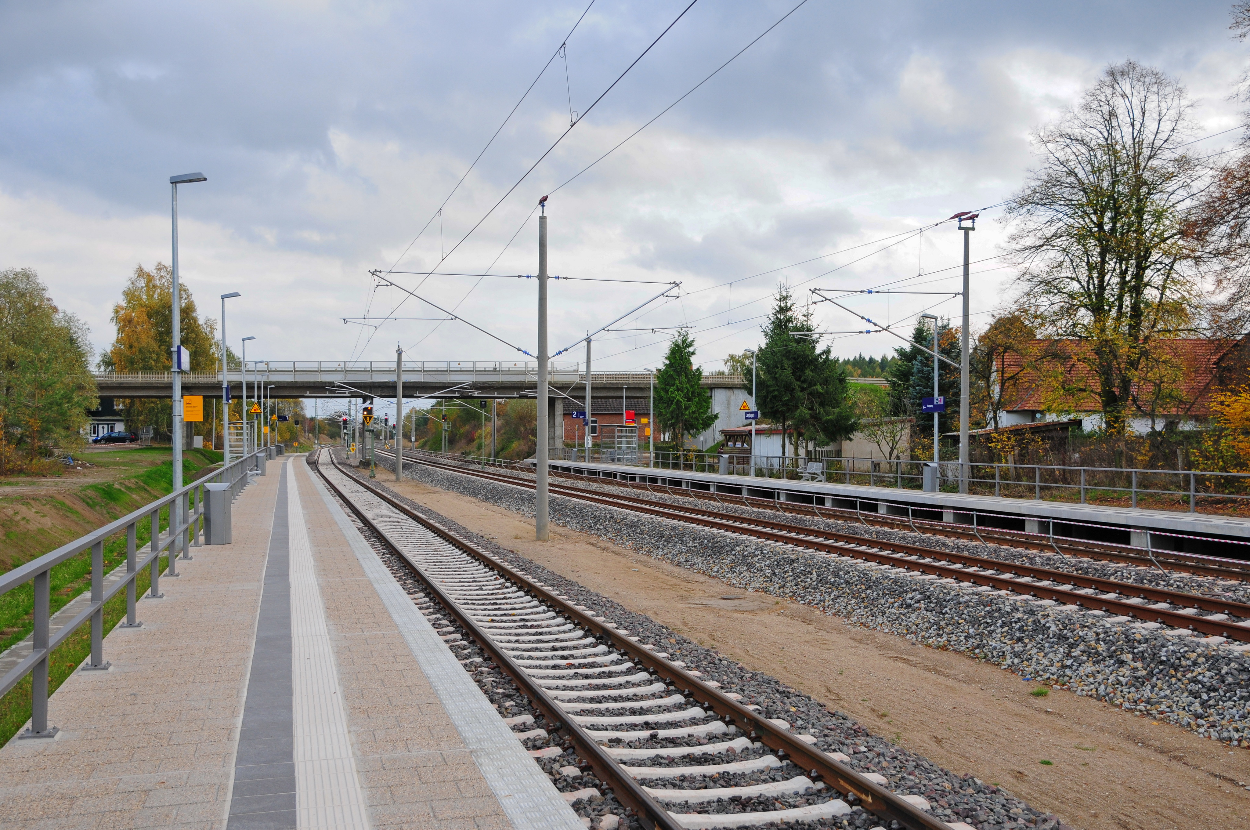 Im Rahmen der Neuanbindung des Bahnhofes Langhagen an den Regionalexpress nach Berlin, wurden hier neue Bahnsteiganlagen errichtet. Seither halten wieder Züge in Langhagen.